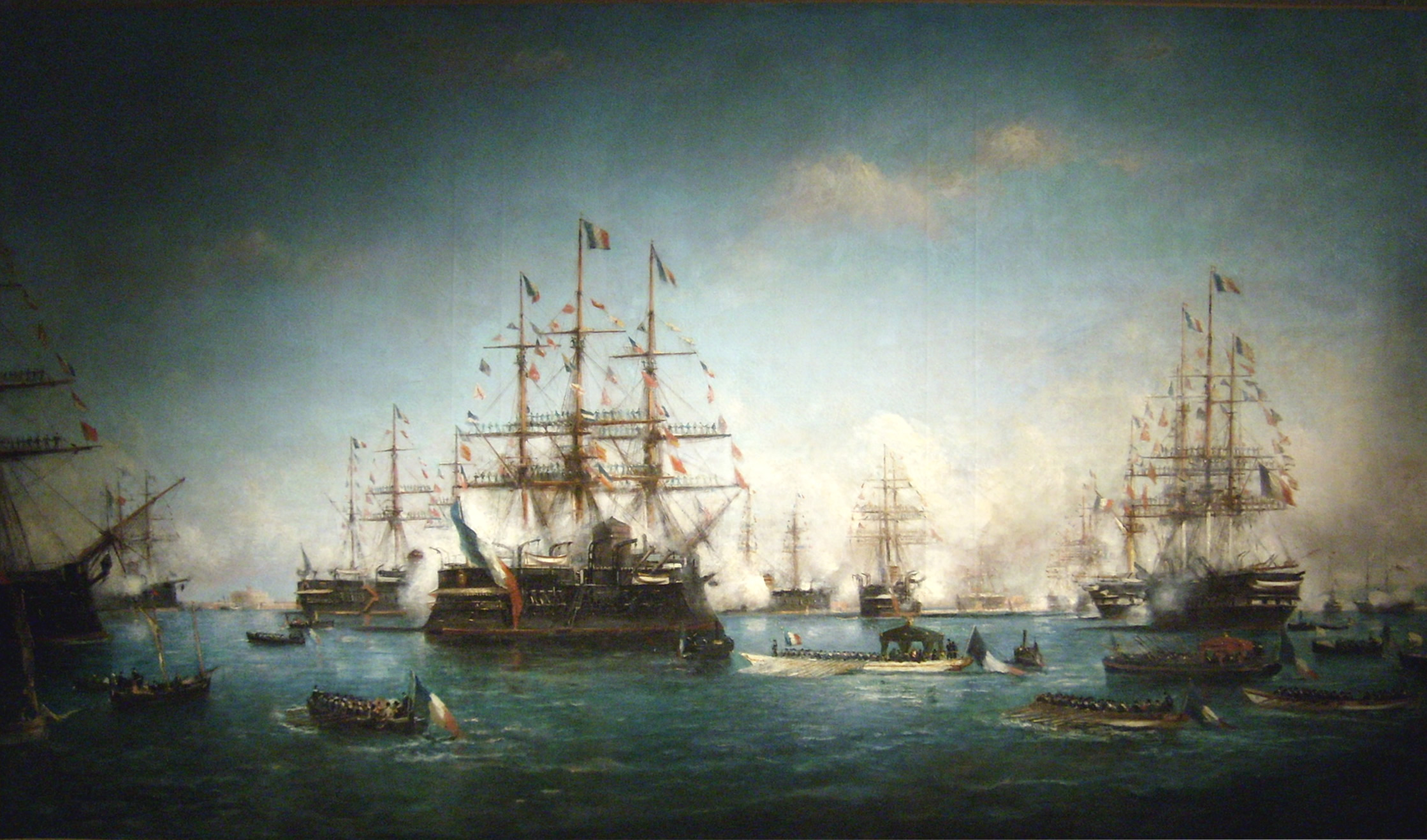 Visite des trois présidents, Paul-Charles-Emmanuel Gallard-Lépinay - Musée Thomas-Henry, Cherbourg-Octeville Huile sur toile Visite de Jules Grévy, président de la République, Léon Say, président du Sénat et Léon Gambetta, président de la Chambre des députés, à Cherbourg en août 1880.